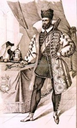 Bartha János (1799–1852) az első Bánk bán – a képen Zrínyi szerepében, Theodor Körner: Zrínyi vagy Szigetvár ostroma című szomorújátékában.